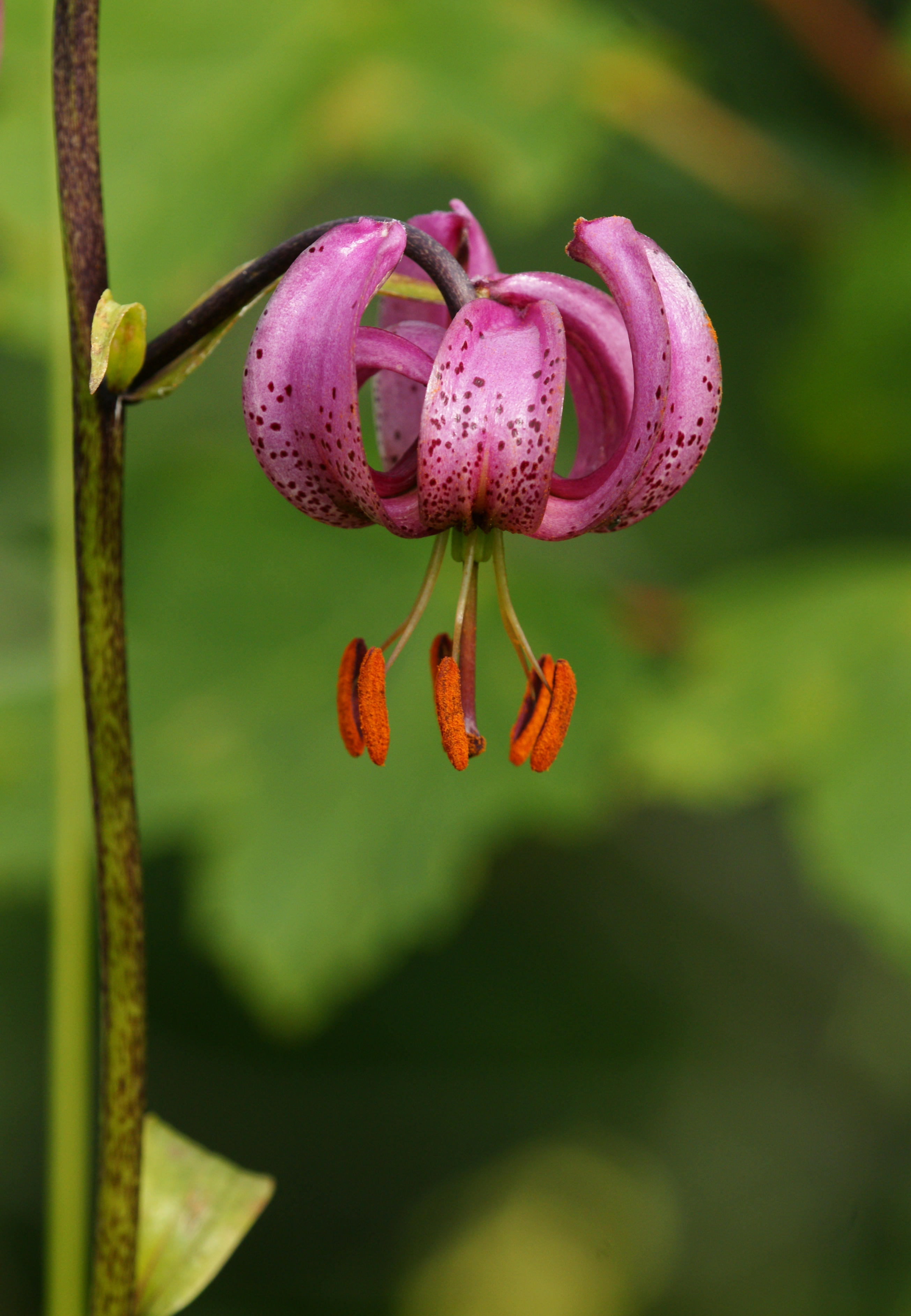 Der Türkenbund (Lilium martagon), oder auch Türkenbund-Lilie, ist eine Pflanzenart aus der Gattung der Lilien (Lilium) in der nach ihr benannten Martagon-Sektion. Fundort: am Wurzelweg zum 1.456m hohen Staufenberg bei Dornbirn.